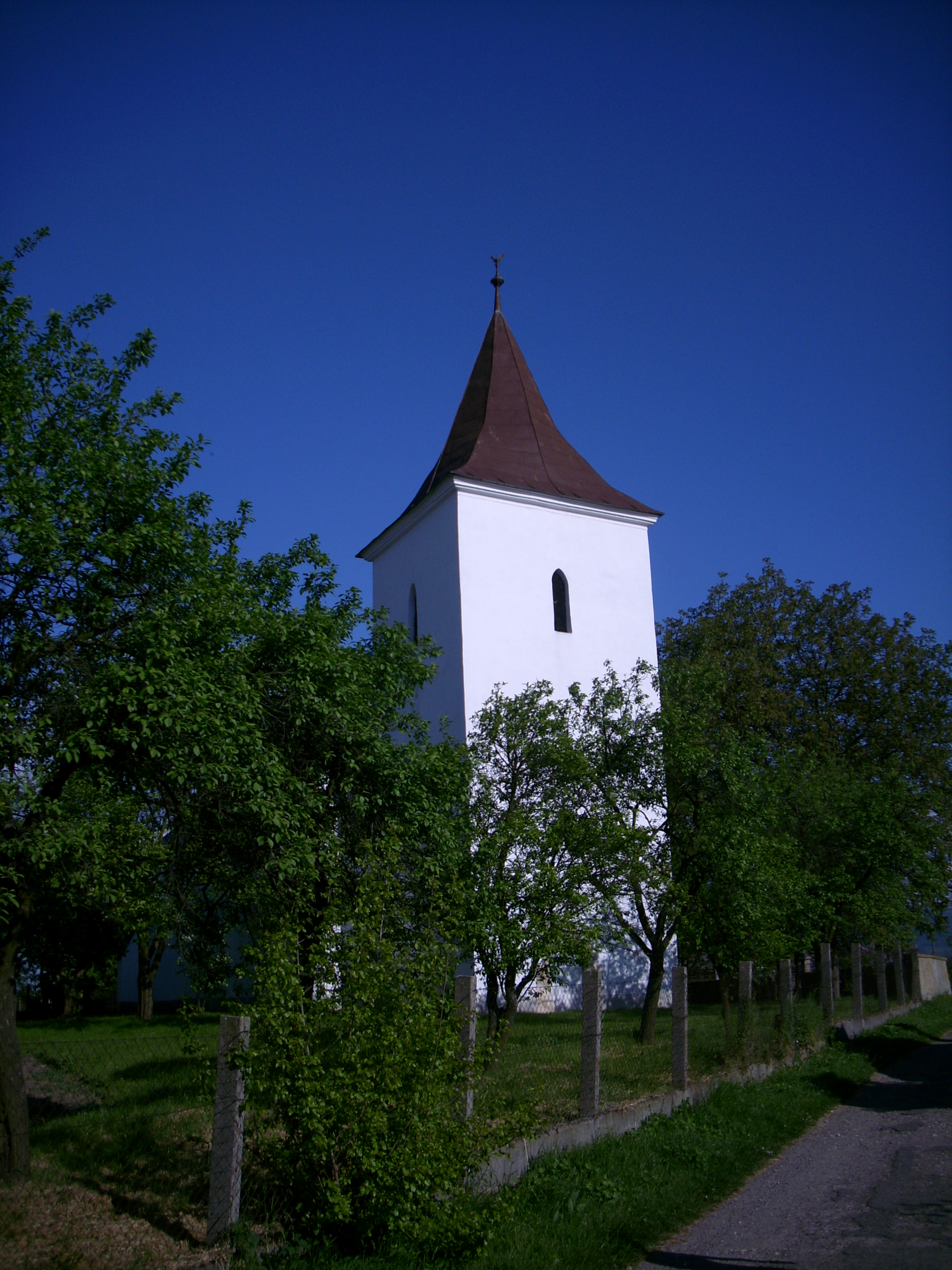 Református templom, Tornyosnémeti